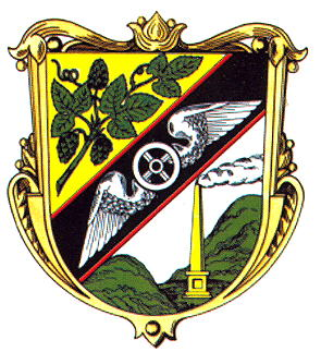 znak obce Měcholupy